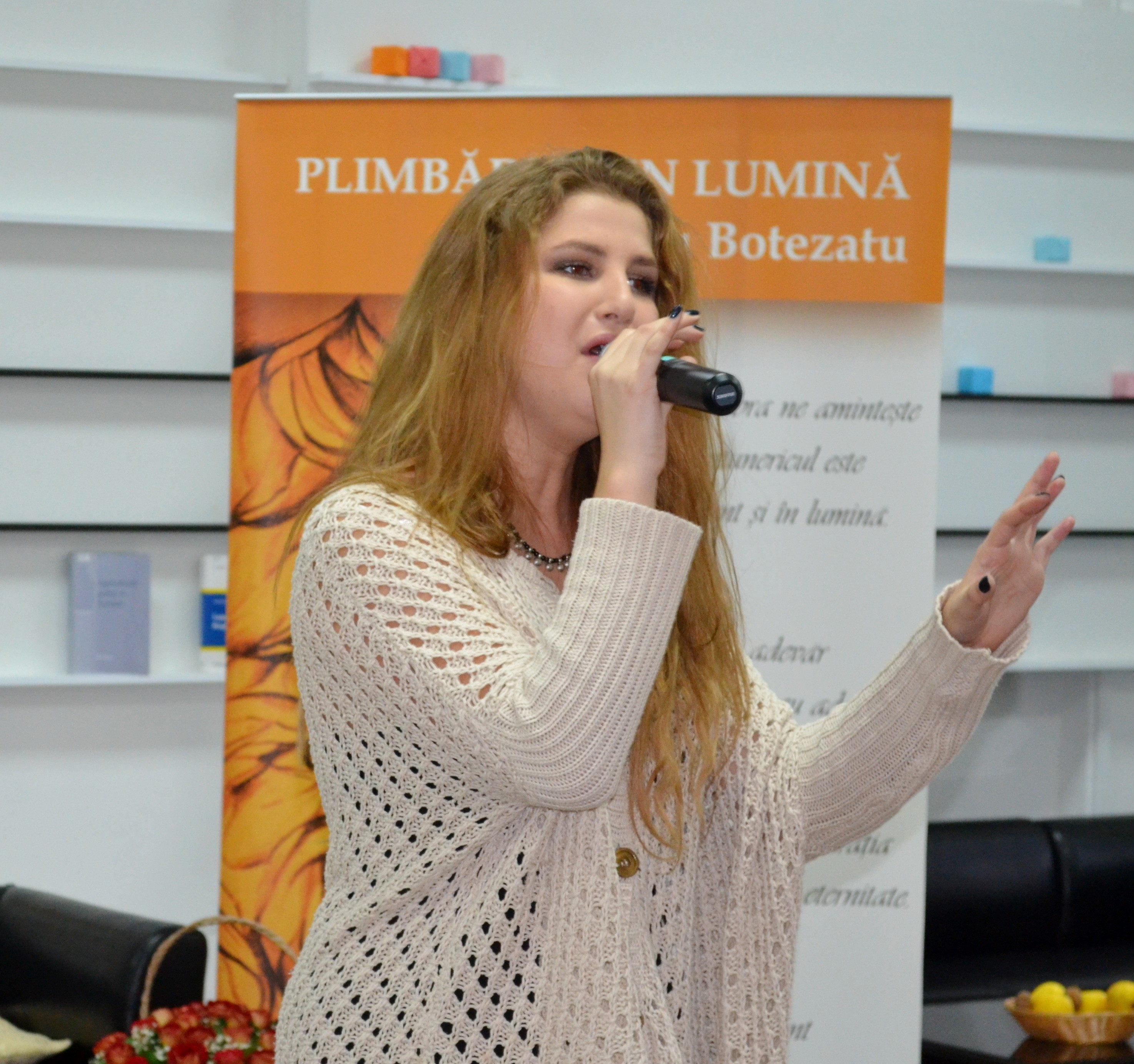 Dara